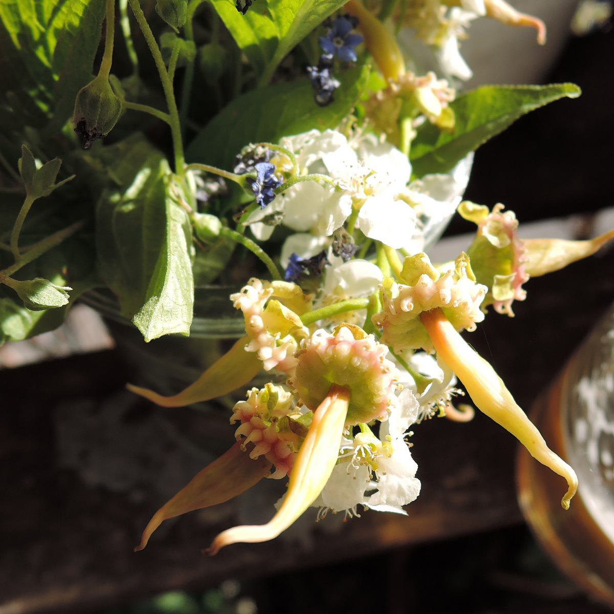 "Narrenkappen"-Pilz an einer Traubenkirsche (Taphrina padi an Prunus padus)